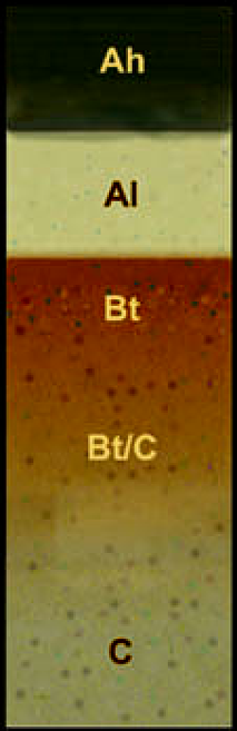 Bodenprofil einer mitteleuropäischen Parabraunerde aus Löss mit der Profilfolge Ah-Al-Bt-Bt/C-C